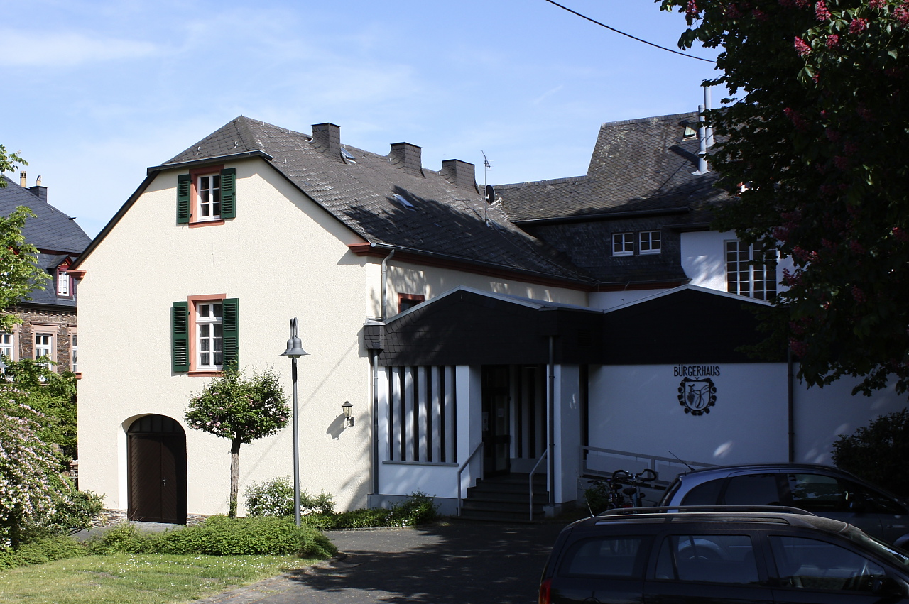 Alte Schule Lösnich mit angebautem Bürgerhaus 2011.